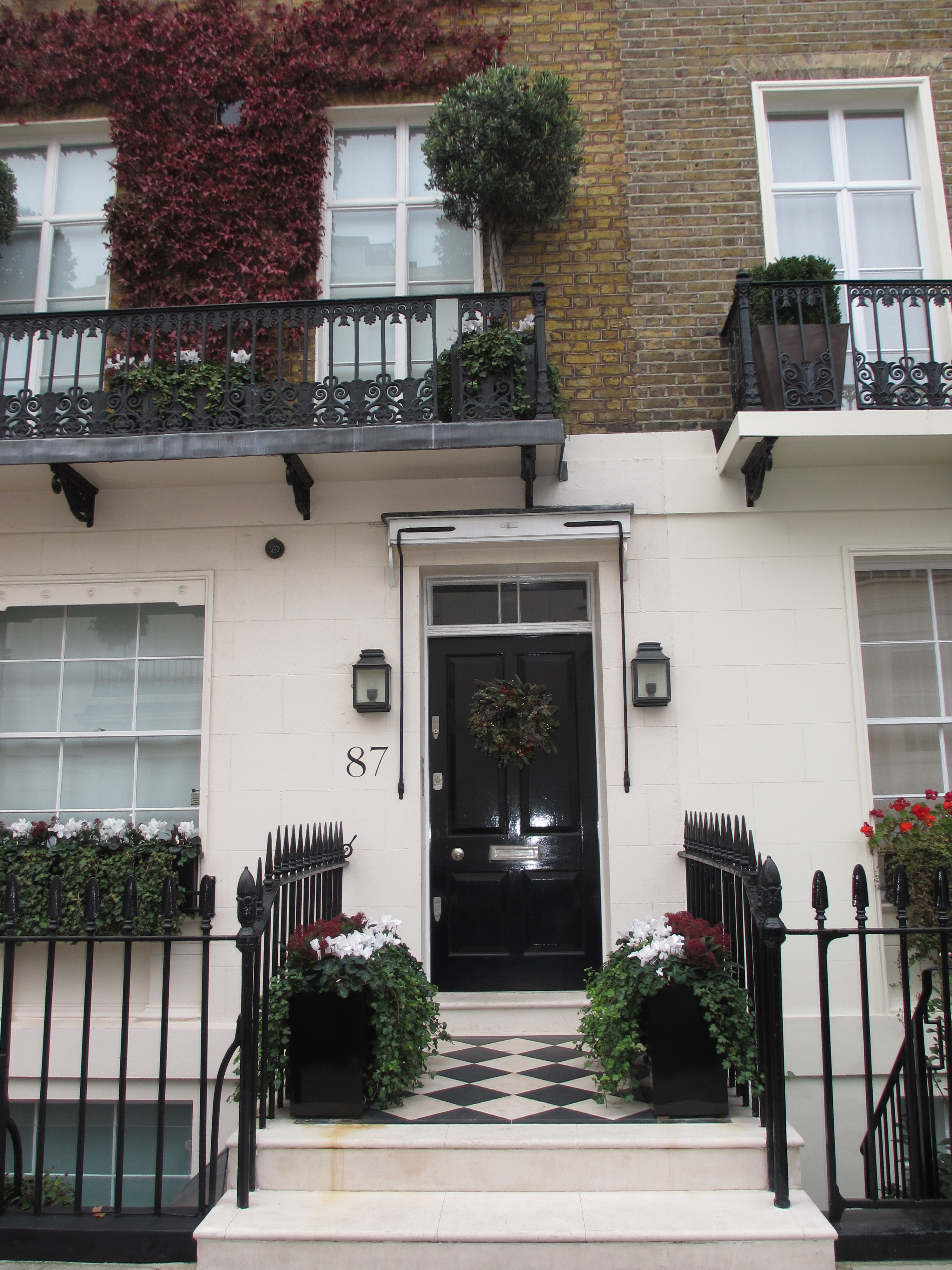 87 Chester Square London - Belgravia. pediatrist & psychoanalyst Donald Winnicott lived there (1951-1971)